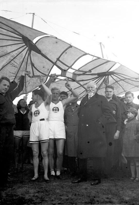 Das erste Gleitflugzeug Otto Lilienthals, des ersten deutschen Luft-Pioniers, wurde in den Gatower Bergen b/Berlin vorgeführt. Den Vorführungen wohnten hunderte von Menschen bei. Gustav Lilienthal (x), der Bruder des deutschen Luft-Pioniers, unter dem ersten Gleitflugzeug während der Vorführung in den Gatower Bergen b/Berlin.